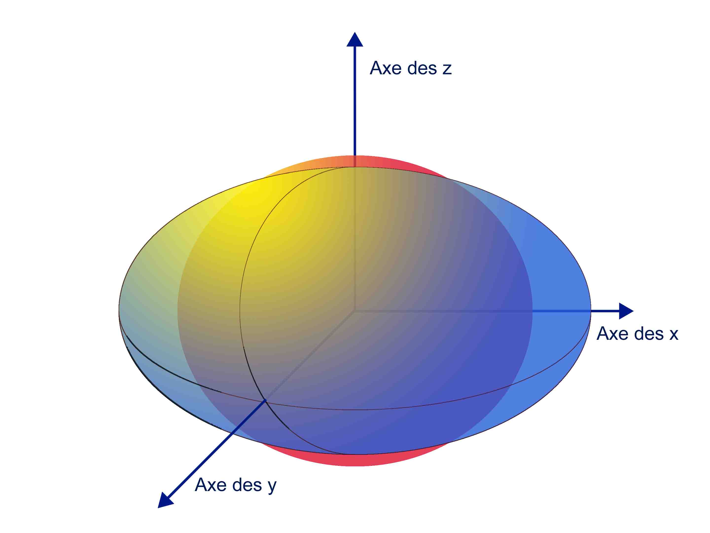 Summary Représentation de la sphère unité en dimension trois pour deux distances euclidienne.Jean-Luc W 8 avril 2006 à 12:30 (CEST) GeometrieImages Template:Portail mathématiques Licensing